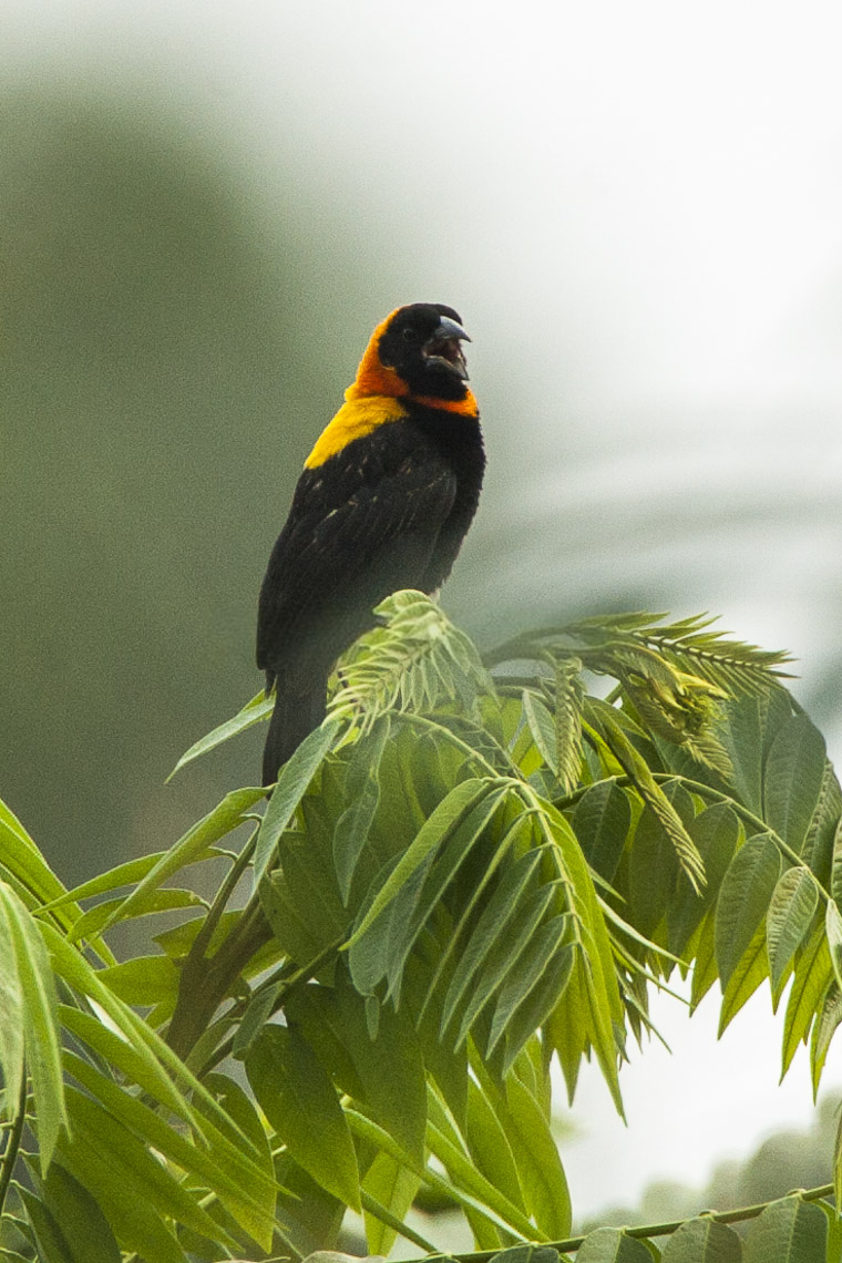 Black Bishop - Budongo - Uganda_ 06_5075